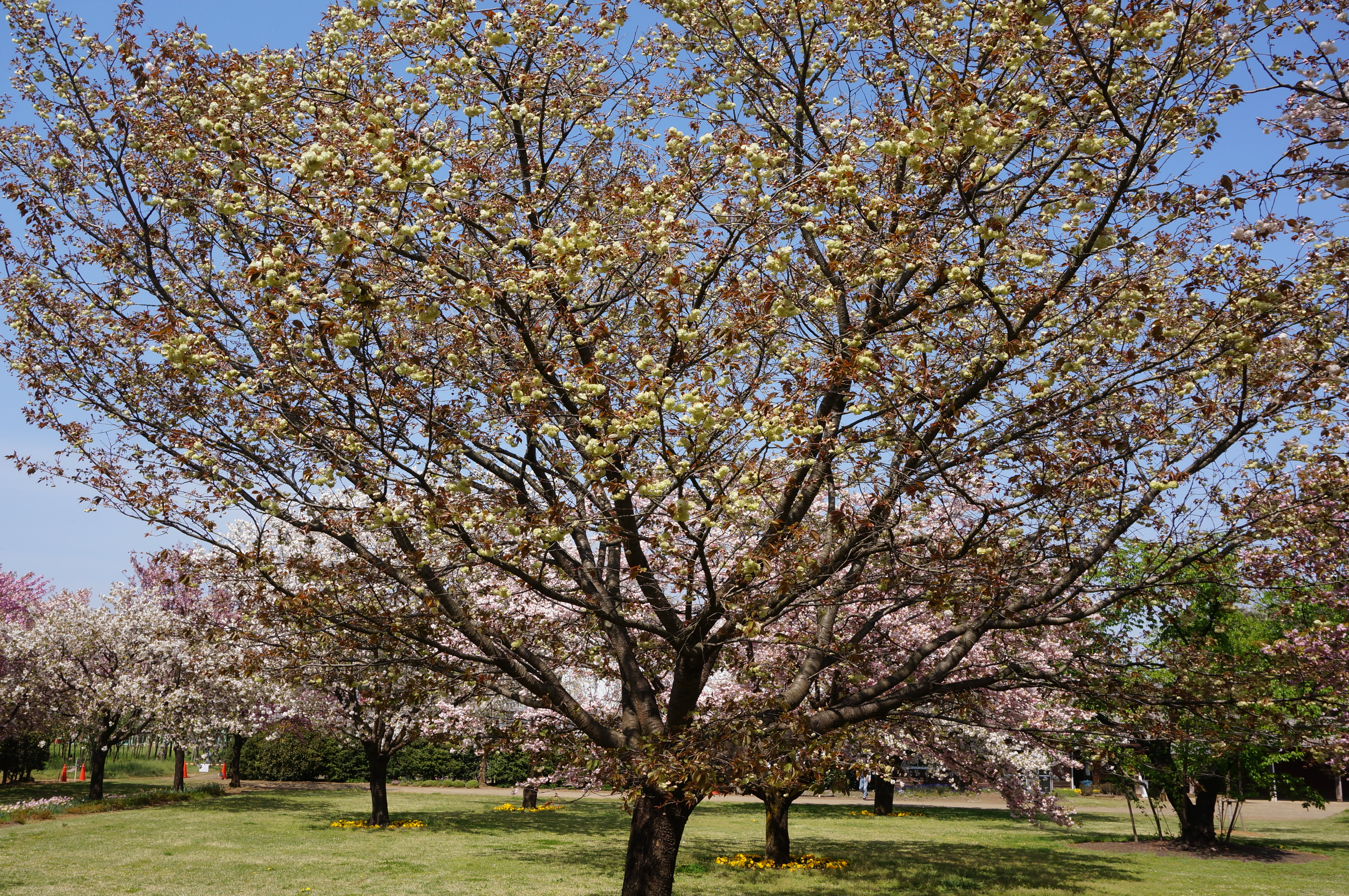 日本花の会結城農場さくら見本園にて